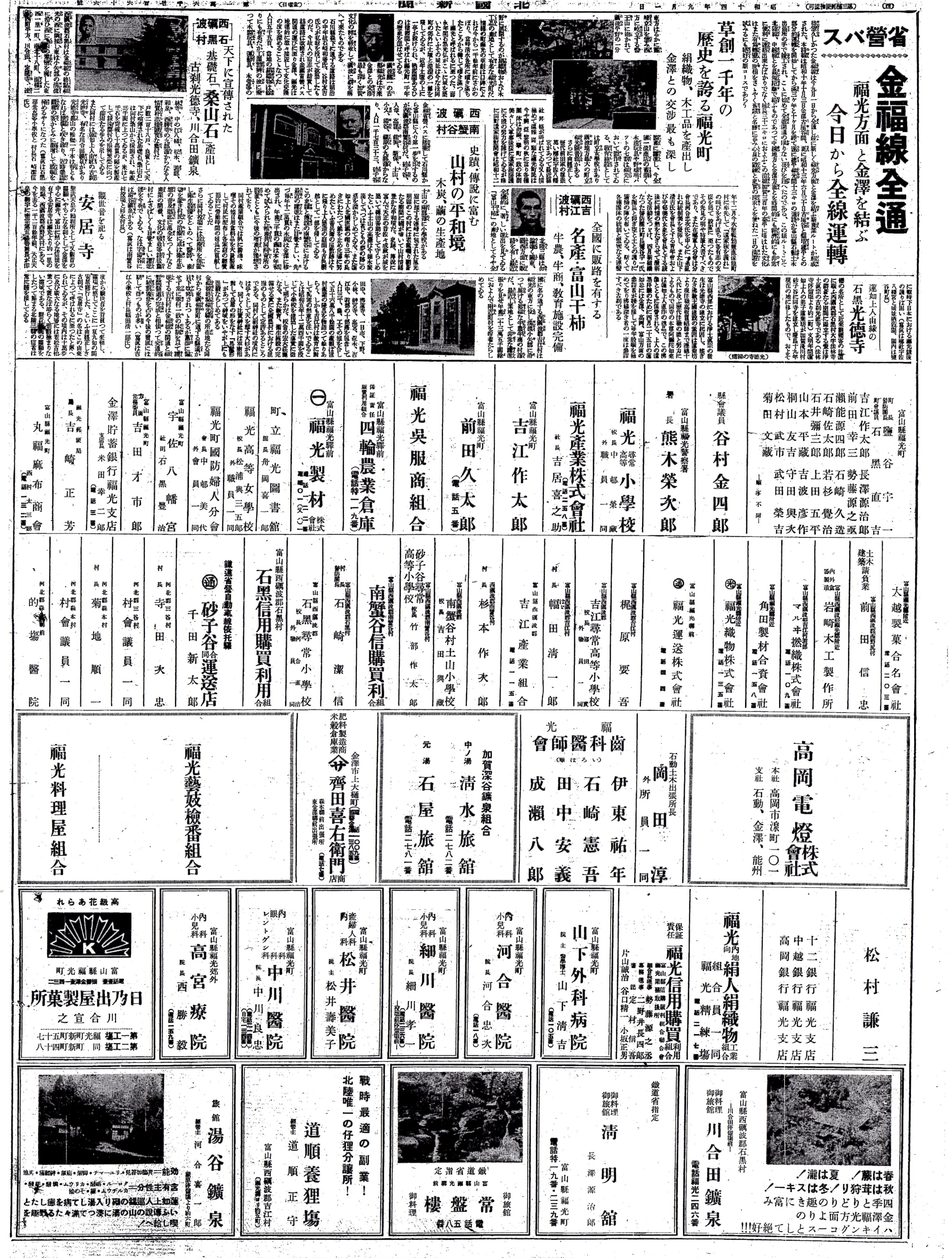 金福線総平駅 - 福光駅間開通に際する新聞